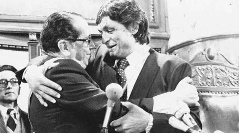 Juramento a la Presidencia 1982